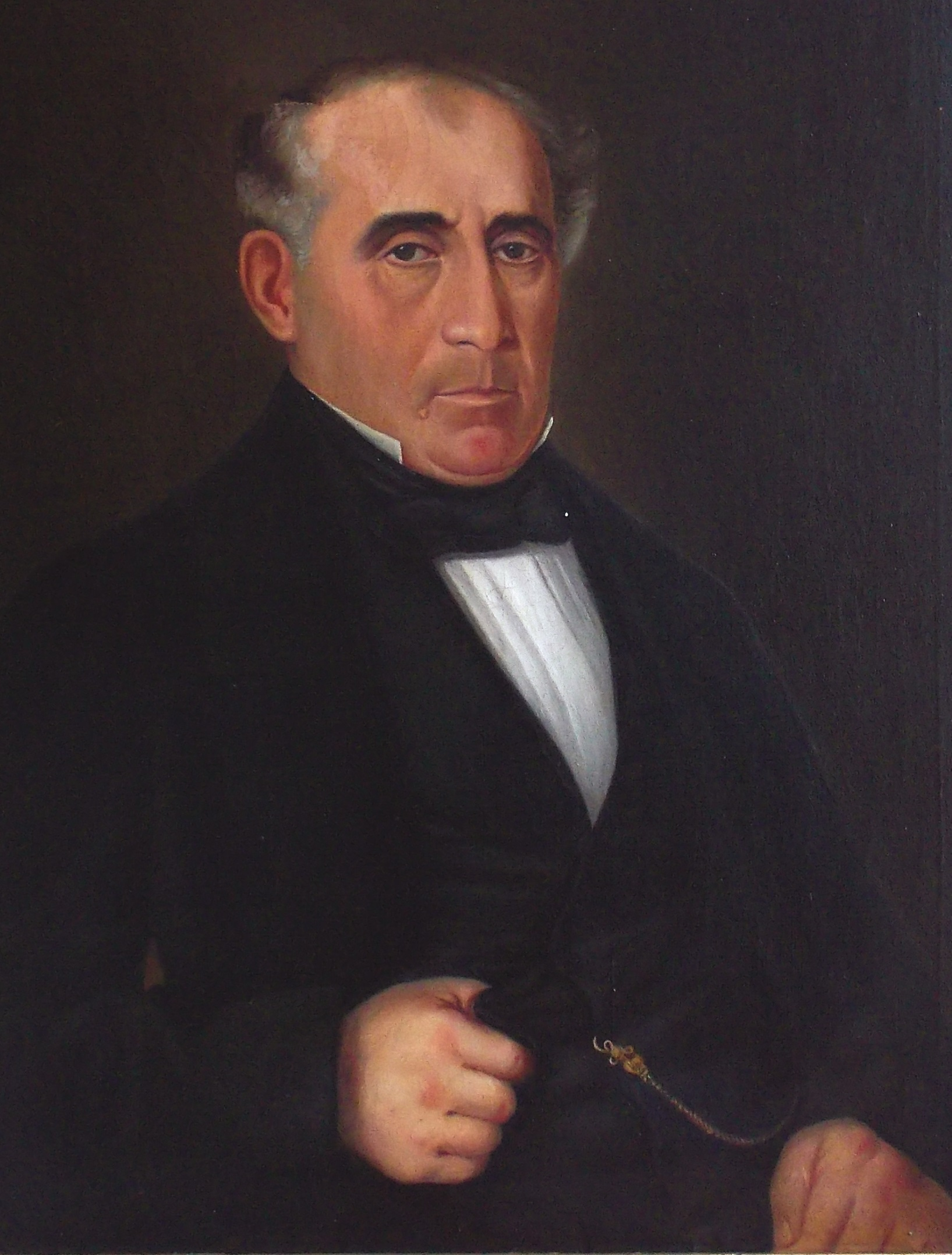 Juan Antonio Alvarez governor of Cordoba province in Argentina